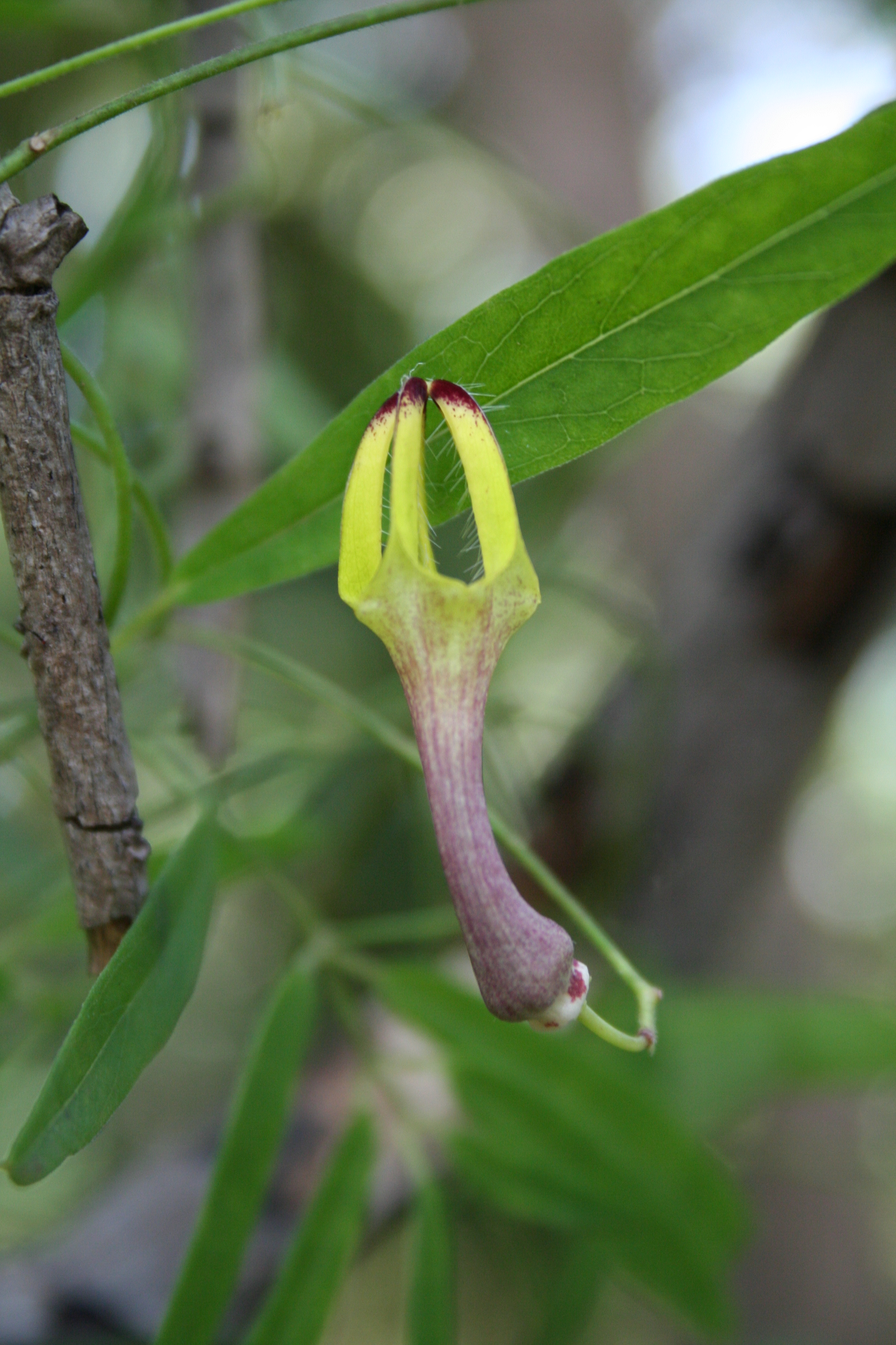 Ceropegia racemosa, F. Cl. de la Kou, SW Burkina Faso